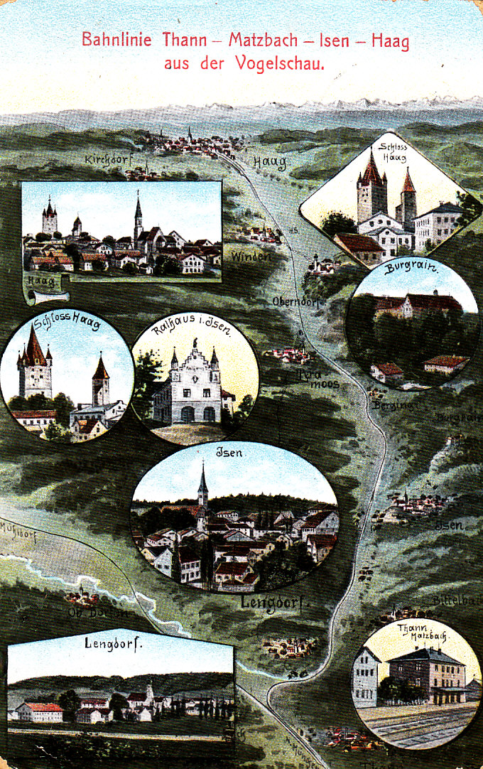 Bahnlinie Thann – Matzbach – Isen – Haag aus der Vogelschau Ansichtskarte Verlag Brem Isen 1910